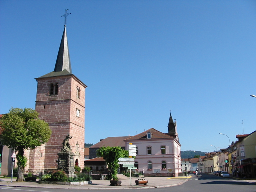 Granges-sur-Vologne Commune du canton de Corcieux (Vosges) Photo personnelle du 1er juillet 2006. Copyright © Christian Amet